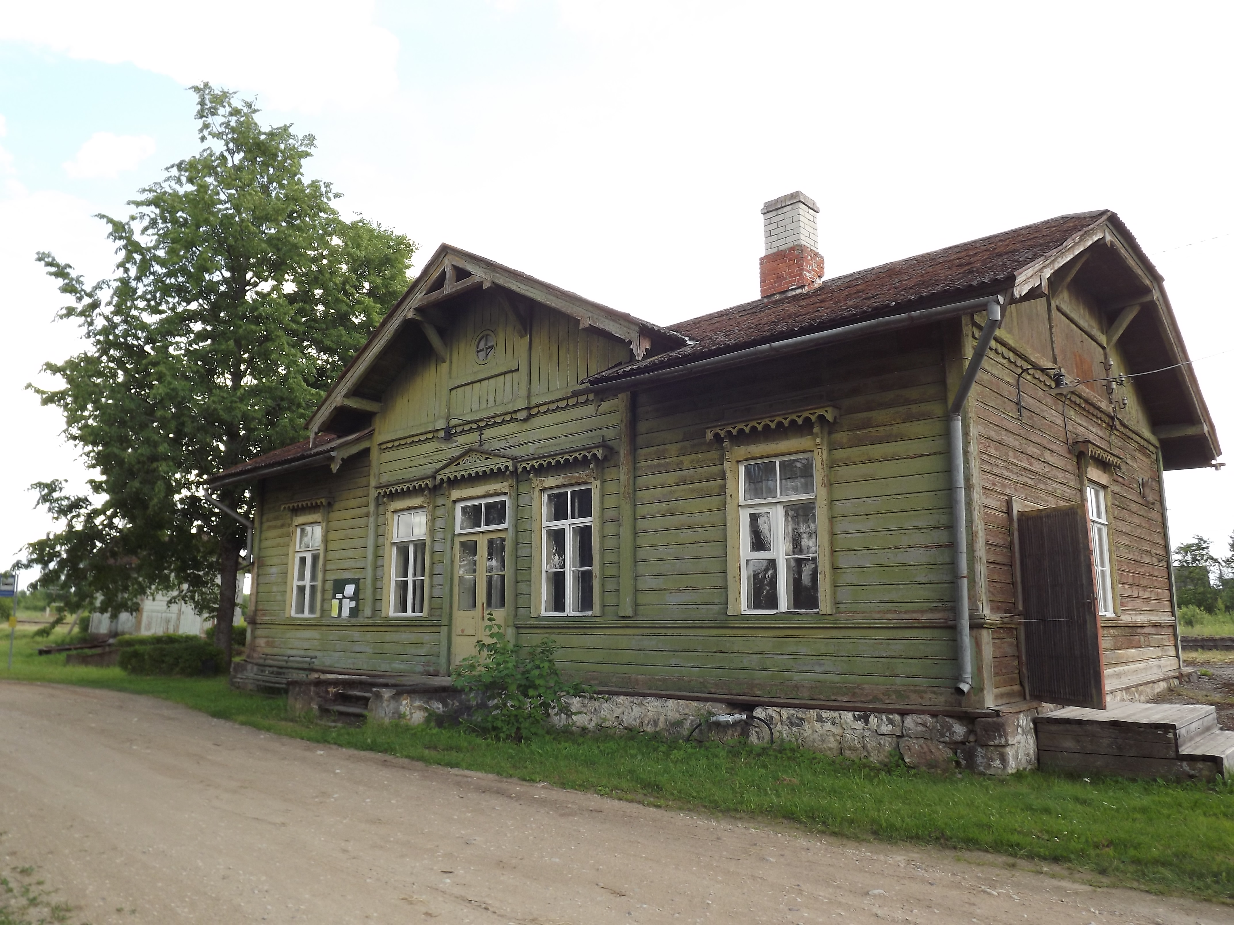 Lepassaare jaamahoone (tagant)